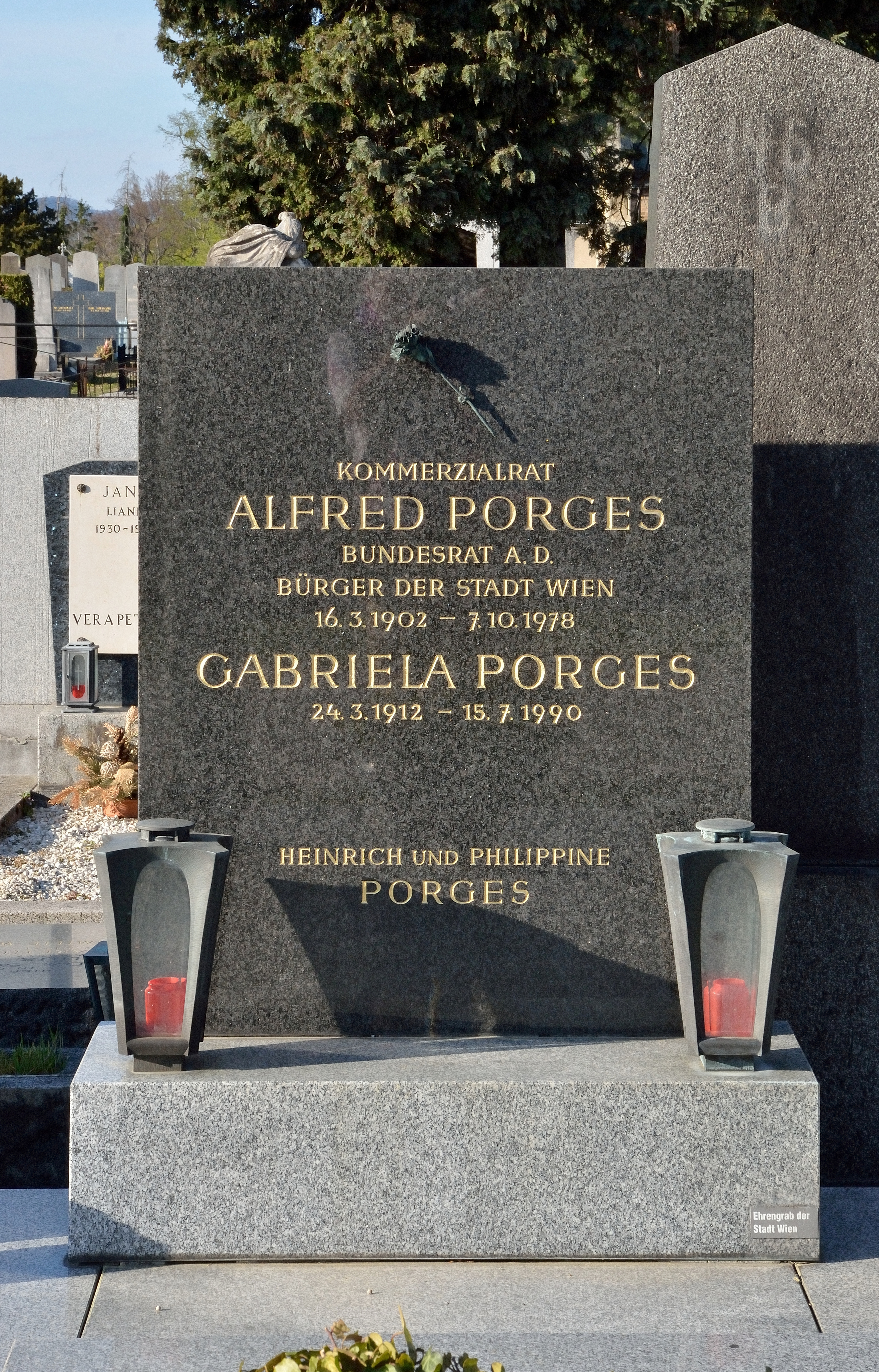 Das Grabmal für Alfred Porges liegt auf dem Hietzinger Friedhof, Gruppe 17, Nr. 23.